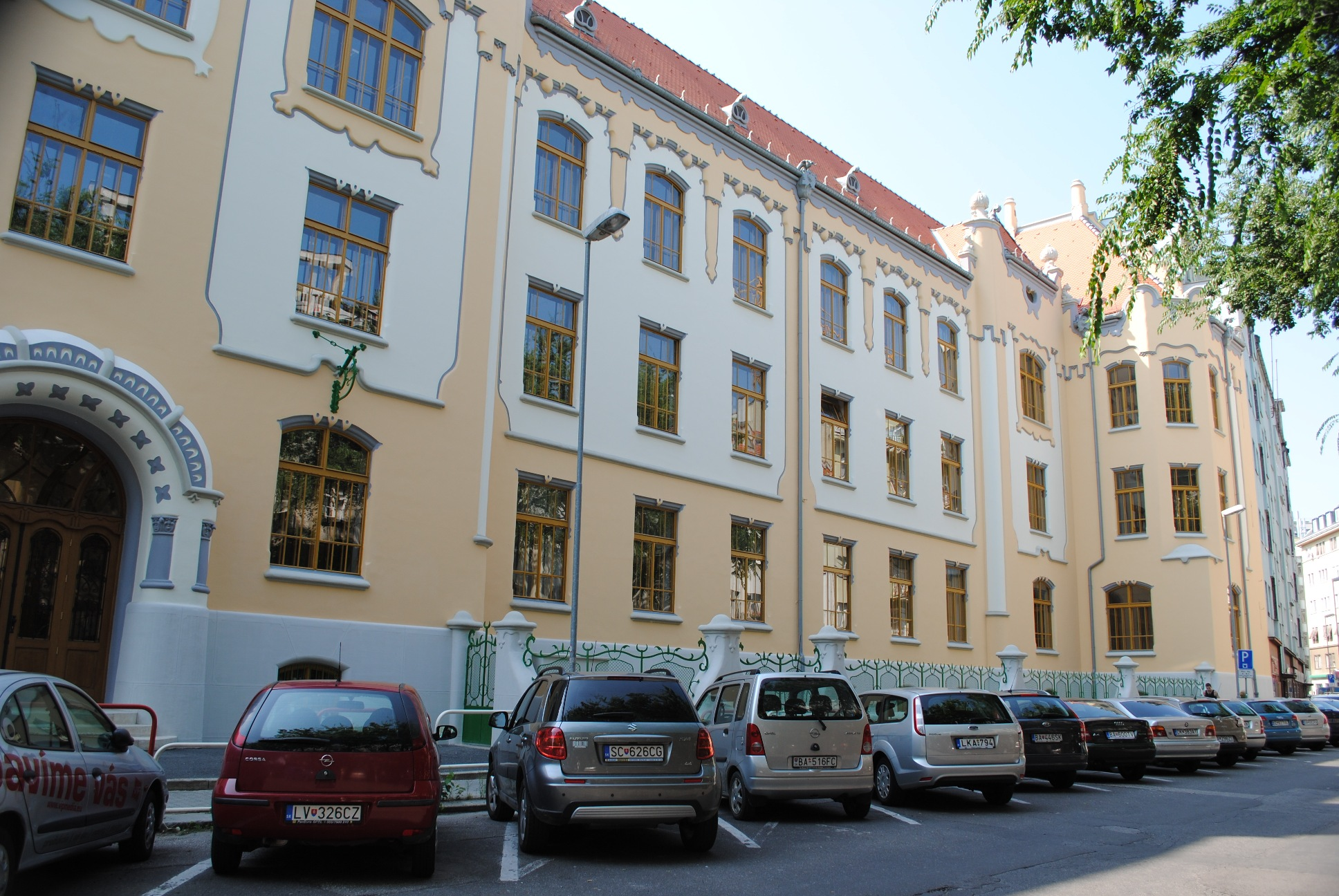 Pozsonyi Királyi Katholikus Főgymnasium, épült Lechner Ödön tervei alapján 1906-1908 között